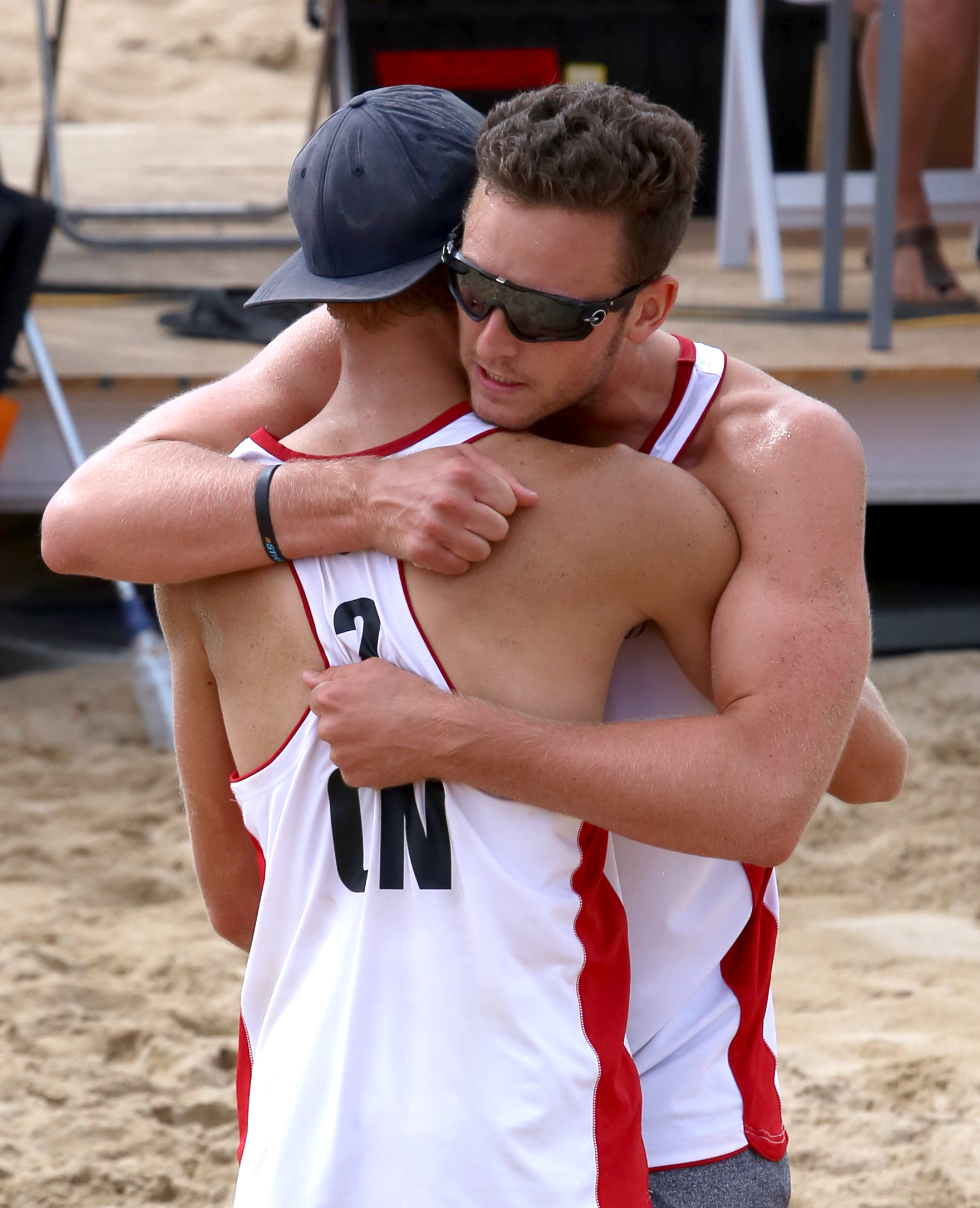 2017-08-04-Paul_Reimer-Beach Volleyball Medals-043